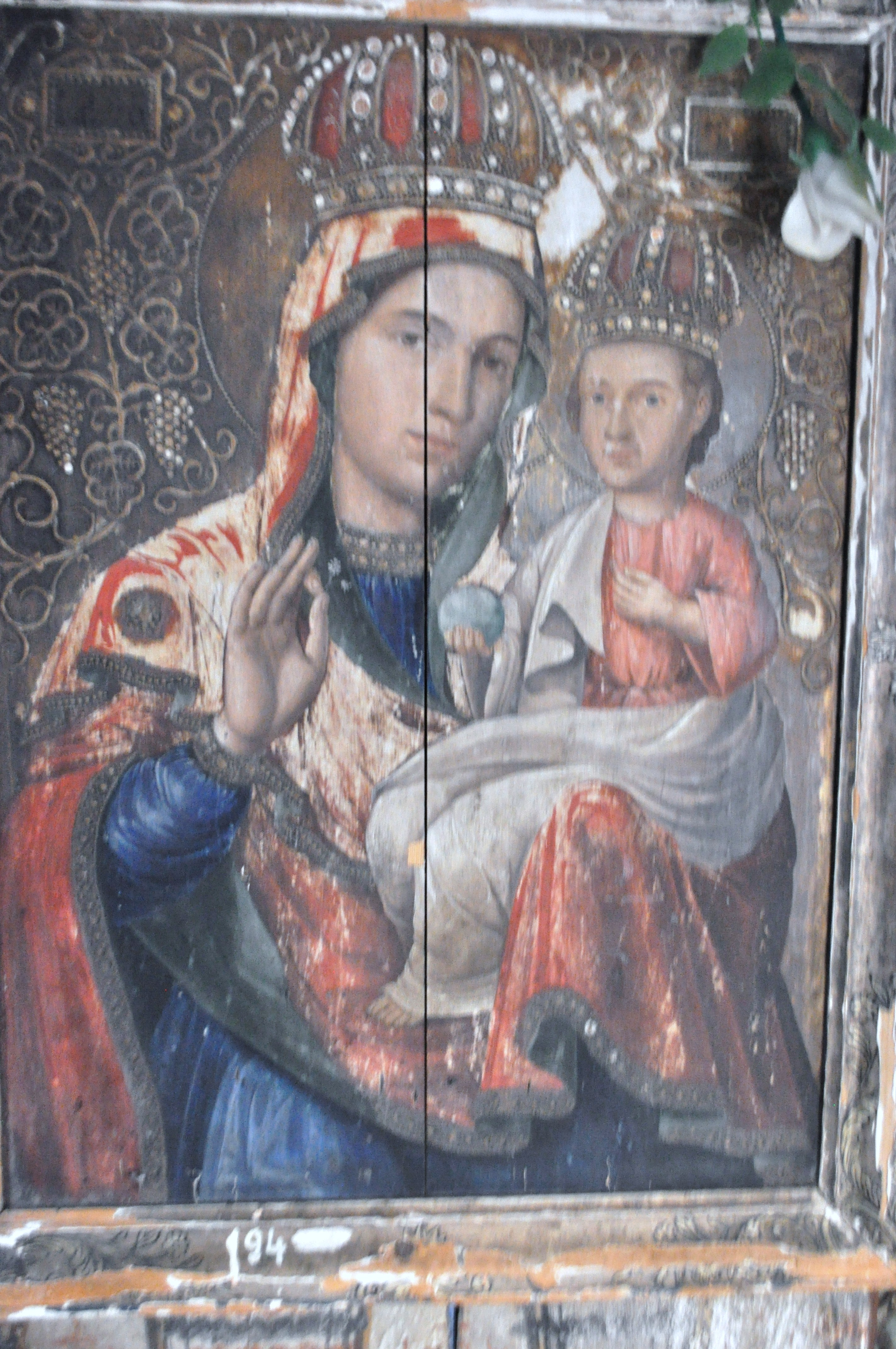 Biserica de lemn „Cuvioasa Paraschiva” din Pianu de Sus, județul Alba